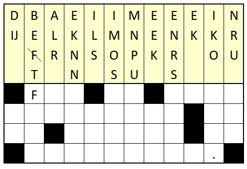 Quotefall Foppe de Haan solution: Fan in skouderklopke krijt nimmen in blessuere